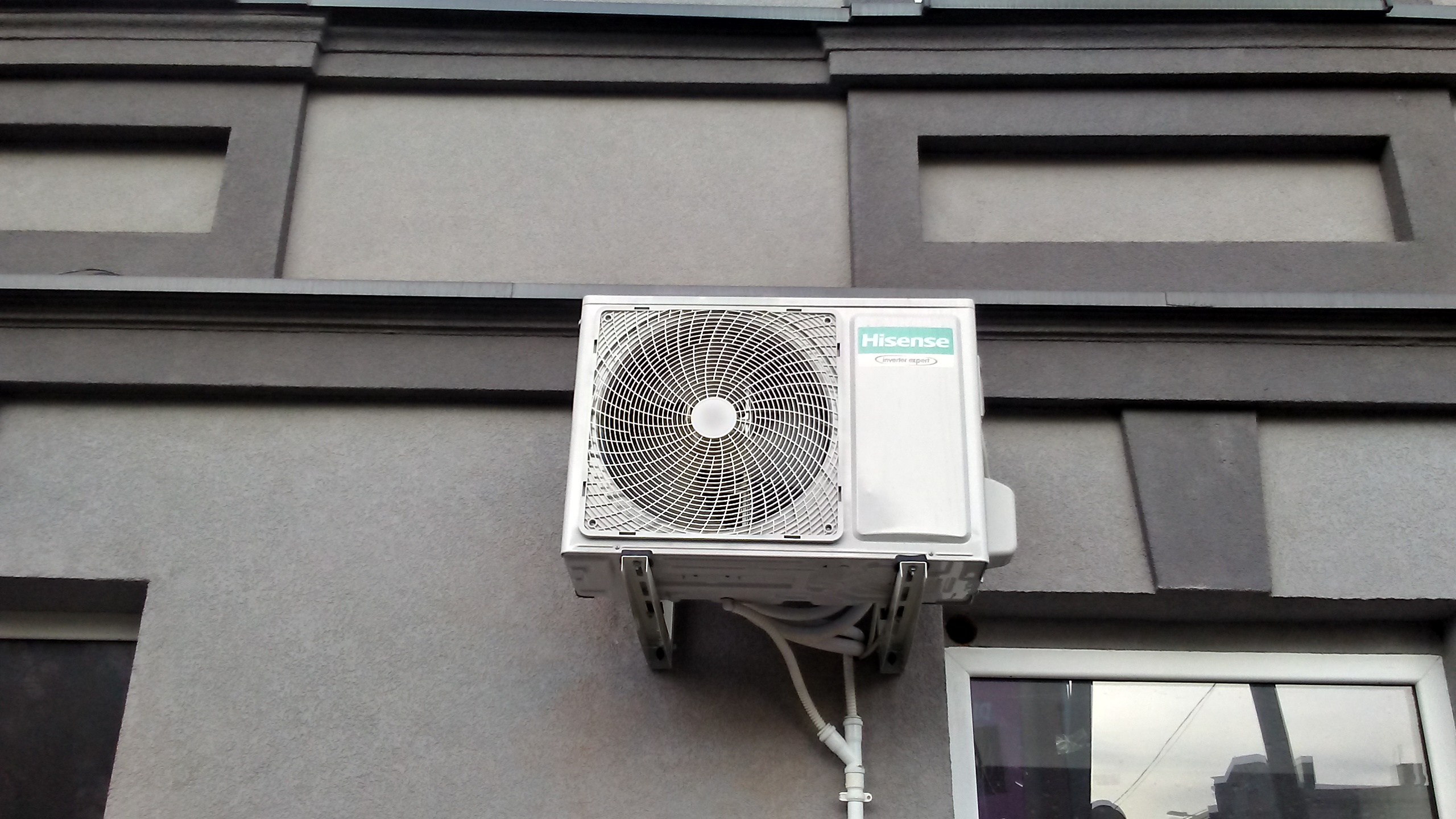 Klimatyzator hiSense na fasadzie budynku w Tomaszowie Mazowieckim w centralnej Polsce